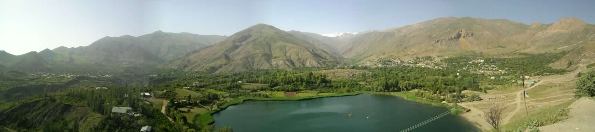 دریاچه اوان در فصل بهار